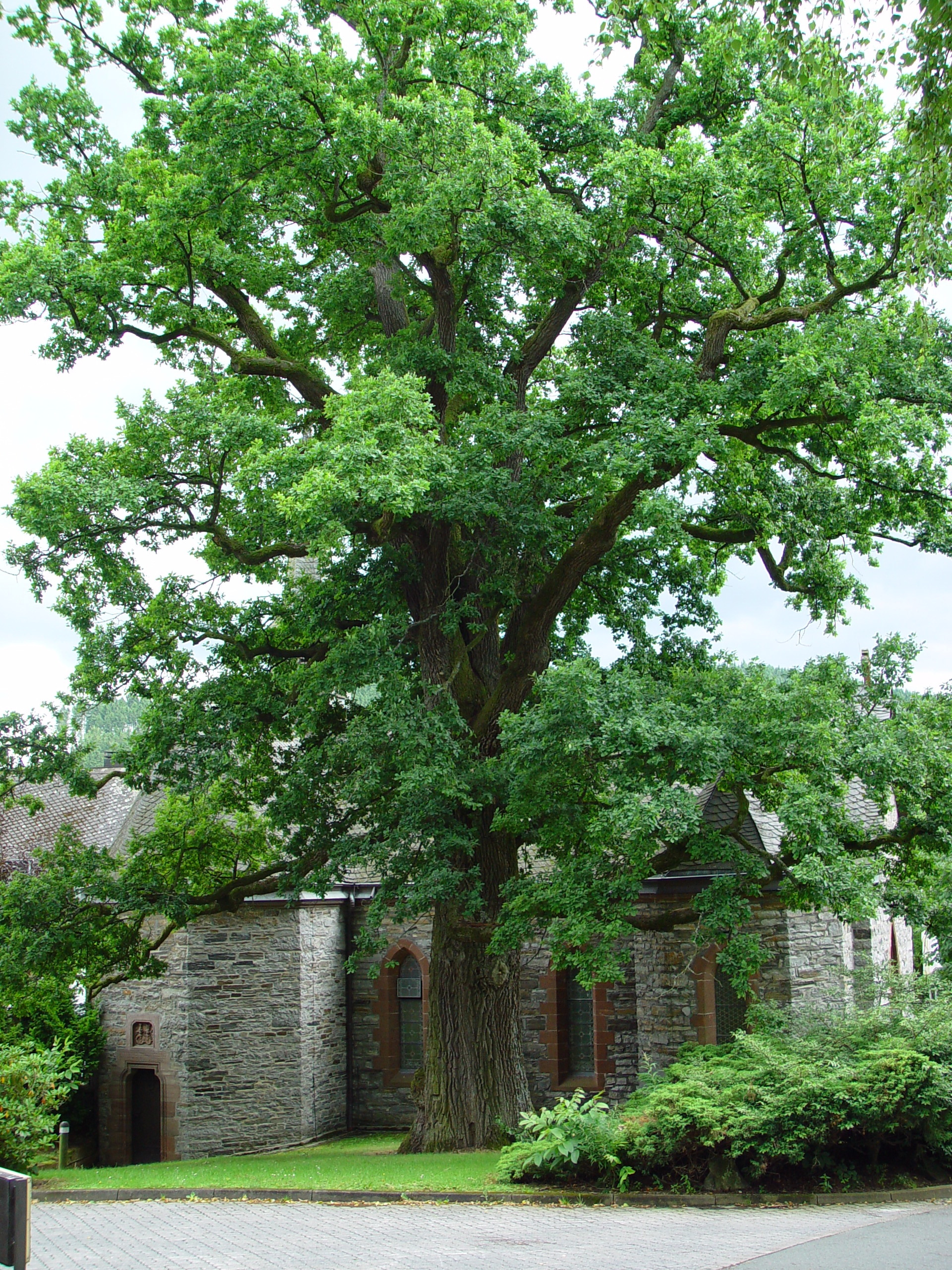 Kapelle in Gevelinghausen, Olsberg; davor Naturdenkmal Eiche (ND 210) This is a photograph of an architectural monument. 69